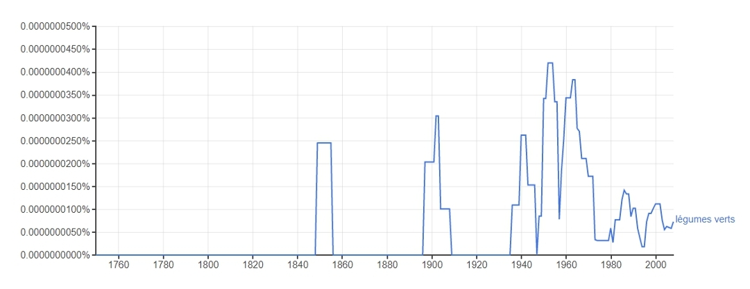 l'expression légume vert est surtout employée à la seconde partie du XXéme siecle